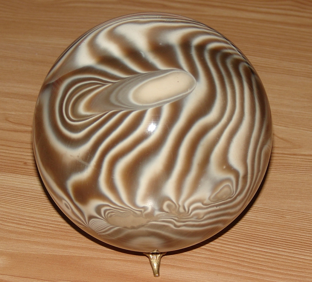 WIELKA KULA Z KRZEMIENIA PASIASTEGO O ŚREDNICY 140mm, GÓRY ŚWIĘTOKRZYSKIE